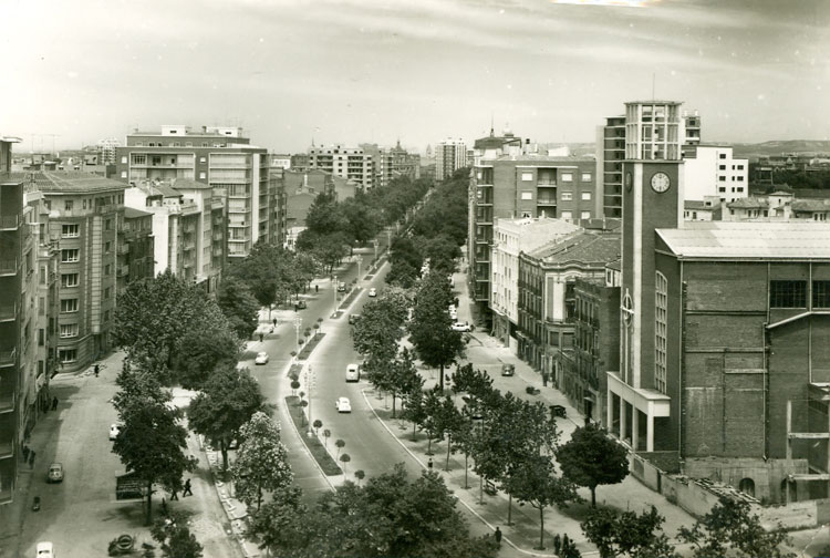 Paseo de Zorrilla - Valladolid - Postal Color